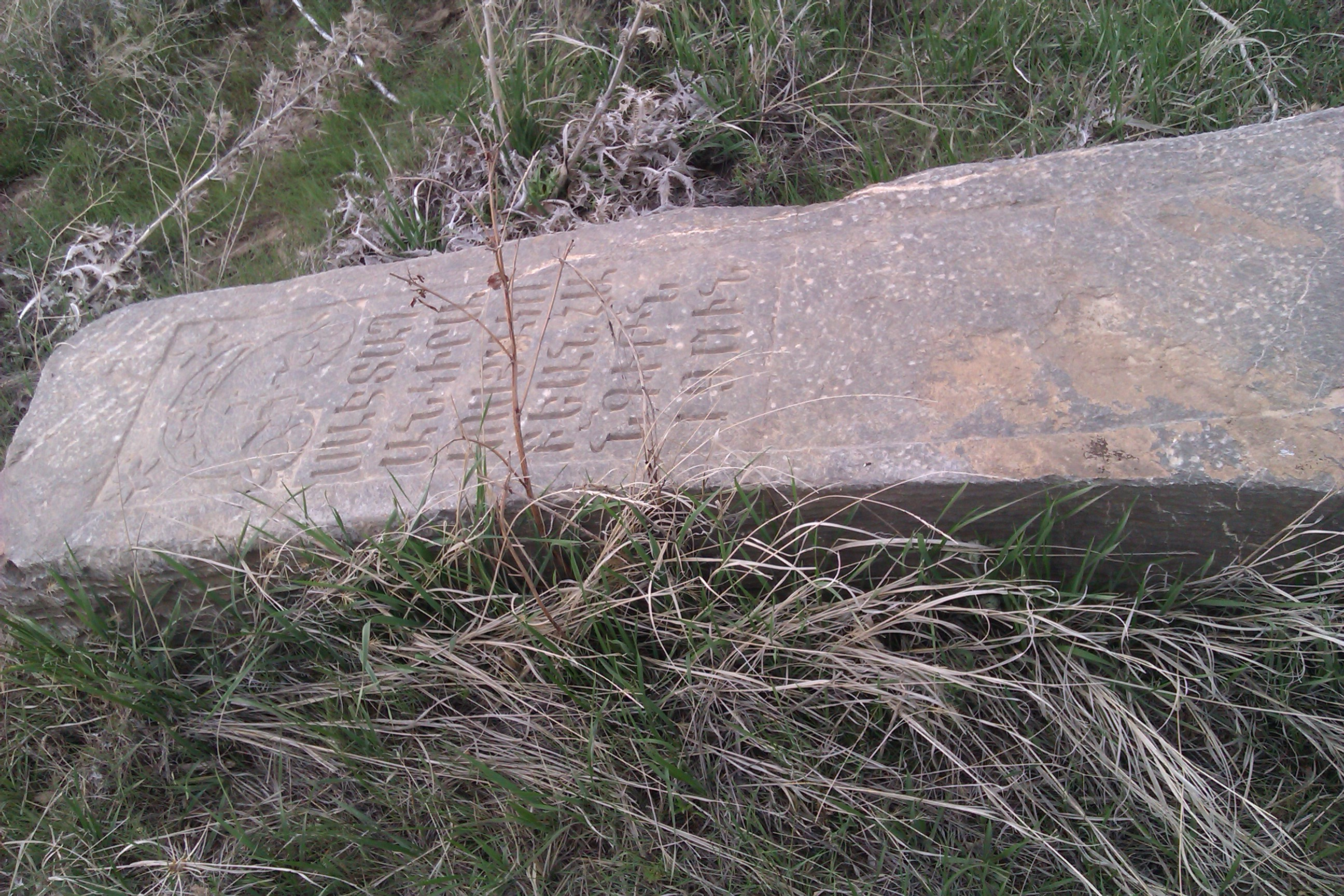 این سنگ نوشته ها مربوط به ساکنین قدیم روستای فرج آباد (ارامنه) میباشد که سالها پیش از این منطقه مهاجرت نموده و برخی از انان ساکن مجیدیه تهران می باشن